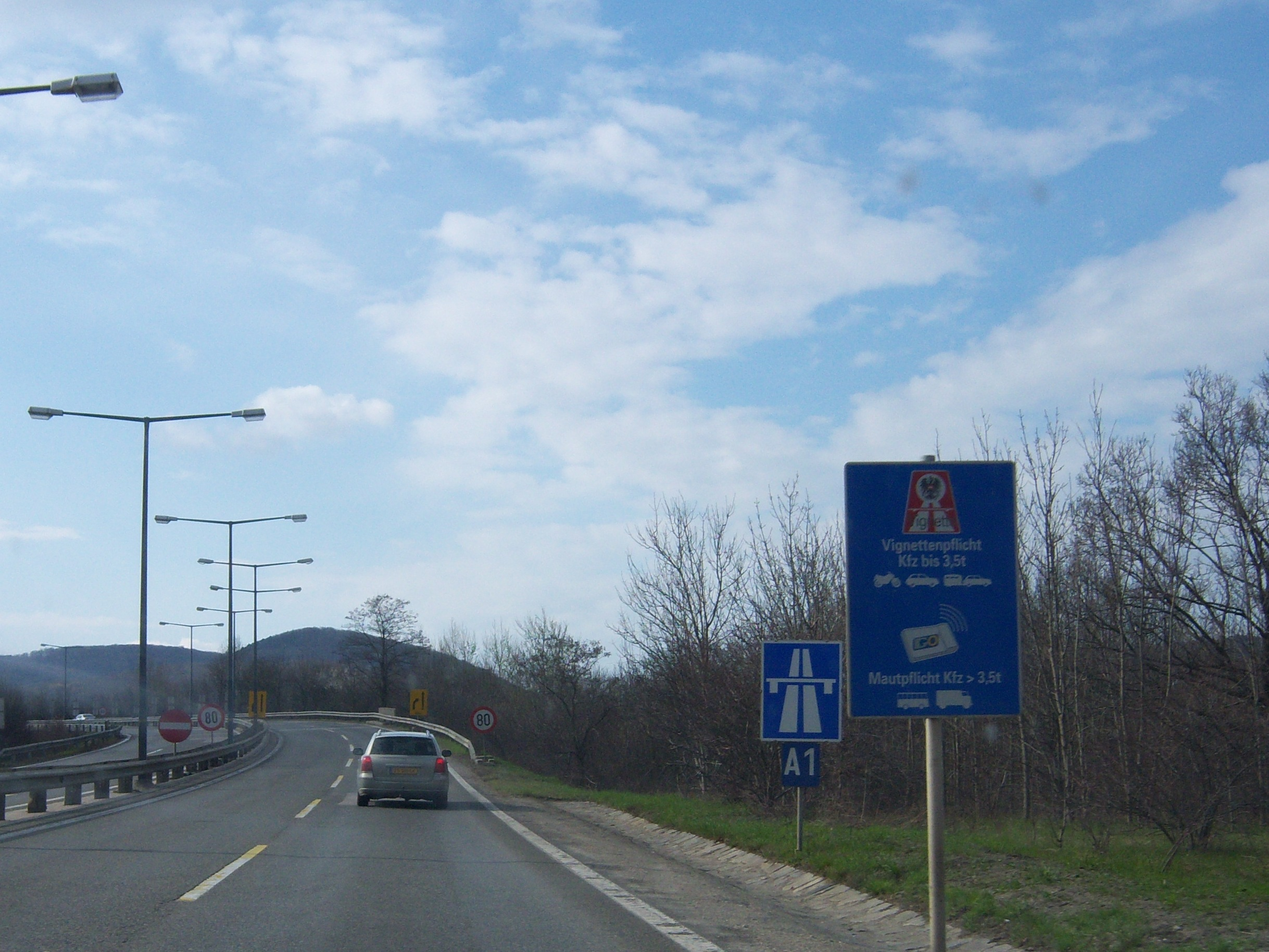 Anfang der West Autobahn (A1) in Auhof